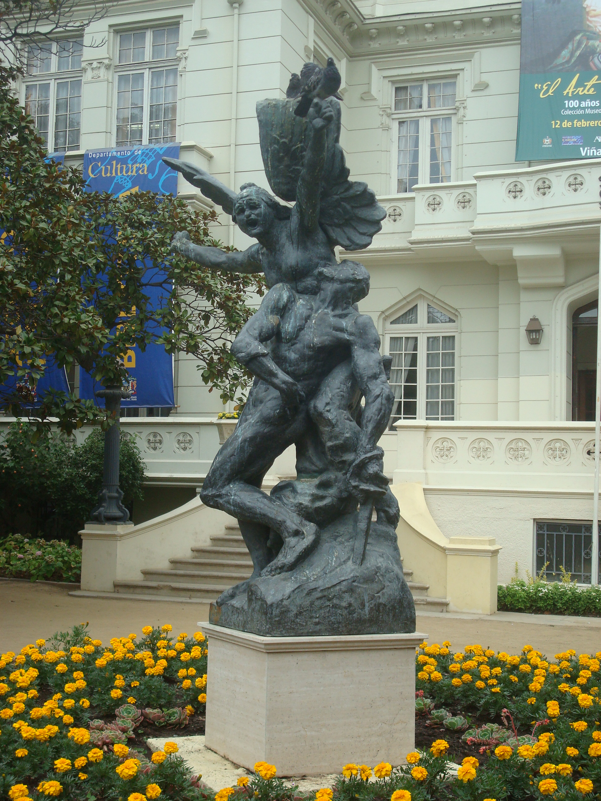 La Defensa, Palacio Carrasco, Viña del Mar, Chile